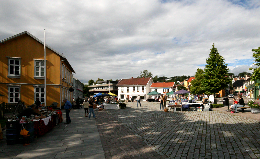 Torget, Drøbak, Norway.